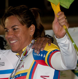 El podio de la velocidad individual femenina Campeonato Panamericano de Ciclismo de Pista, Medellín. 4 de mayo de 2011.